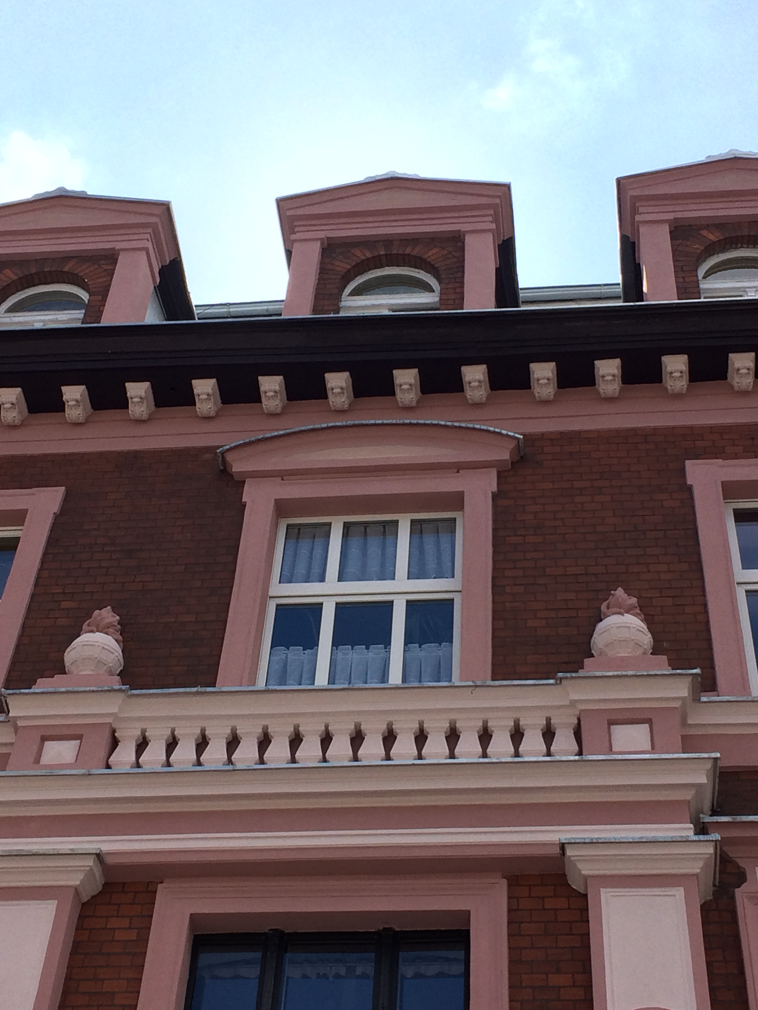 Kamienica przy ul. Dworcowej 33 w Bydgoszczy